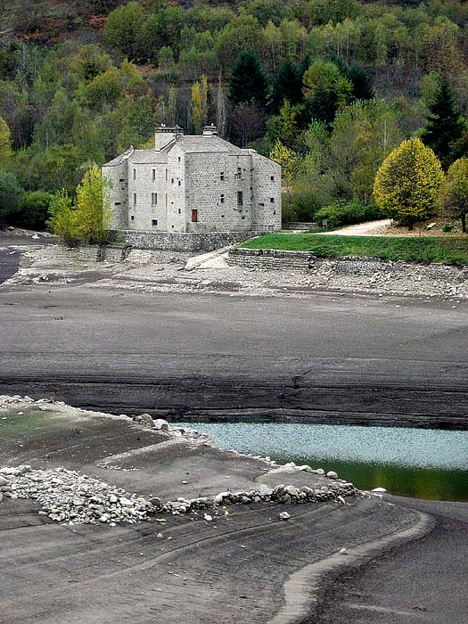 Le château de Castanet au bord de l'Altier, rivière qui devient à cet endroit le Lac de Villefort. Selon les saisons, le niveau de ce lac artificiel baisse et laisse apparaître le lit du torrent et le socle du château.